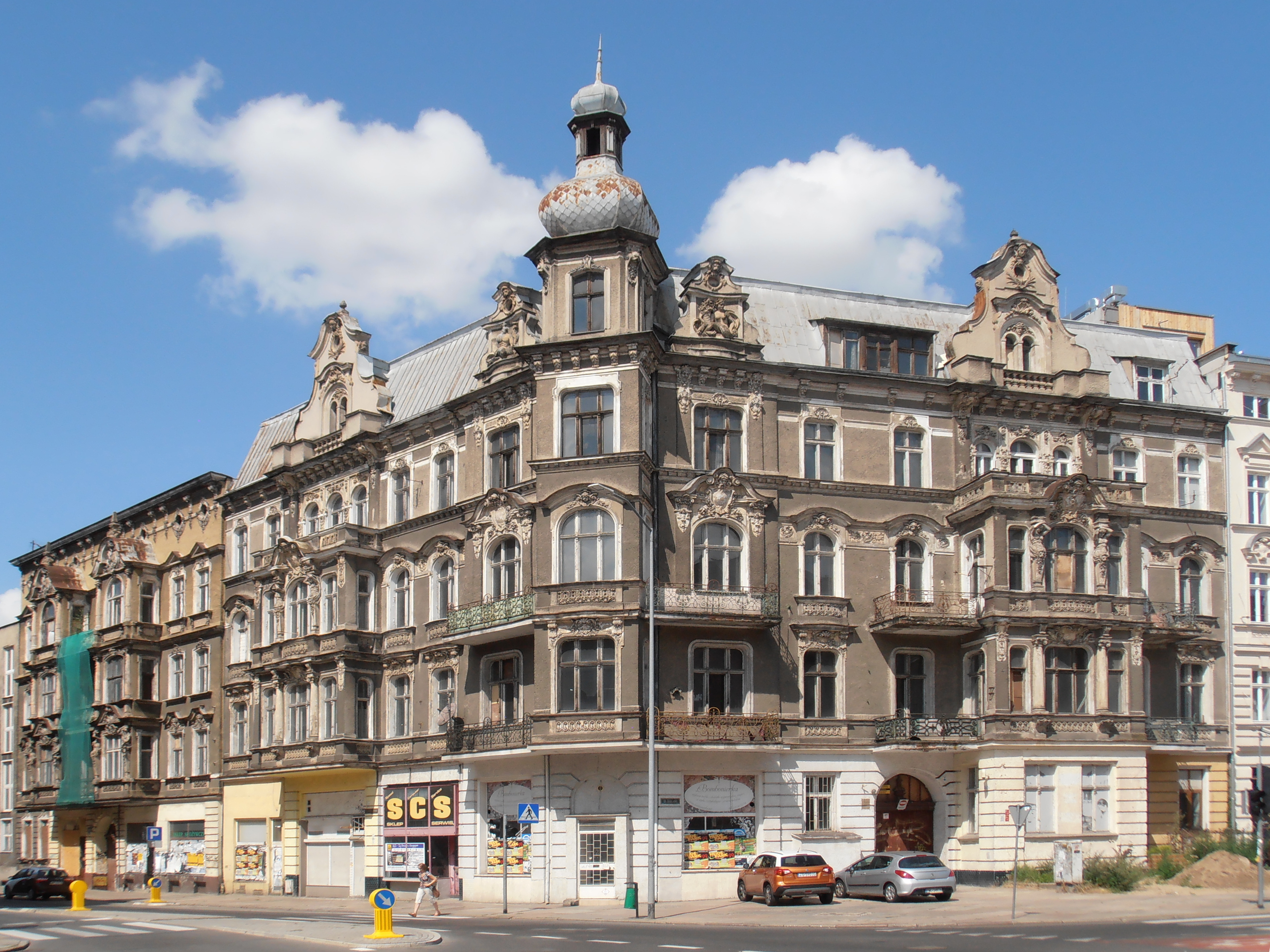 Ulica Śląska w Szczecinie przy narożniku z ulicą Obrońców Stalingradu, 2018 r.